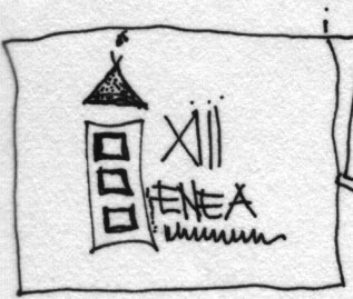 Croquis da marca da FeNEA, criada em 1989 por Claudio Parreiras Reis, então estudante de Arquitetura e Urbanismo, originalmente para o ENEA BH.